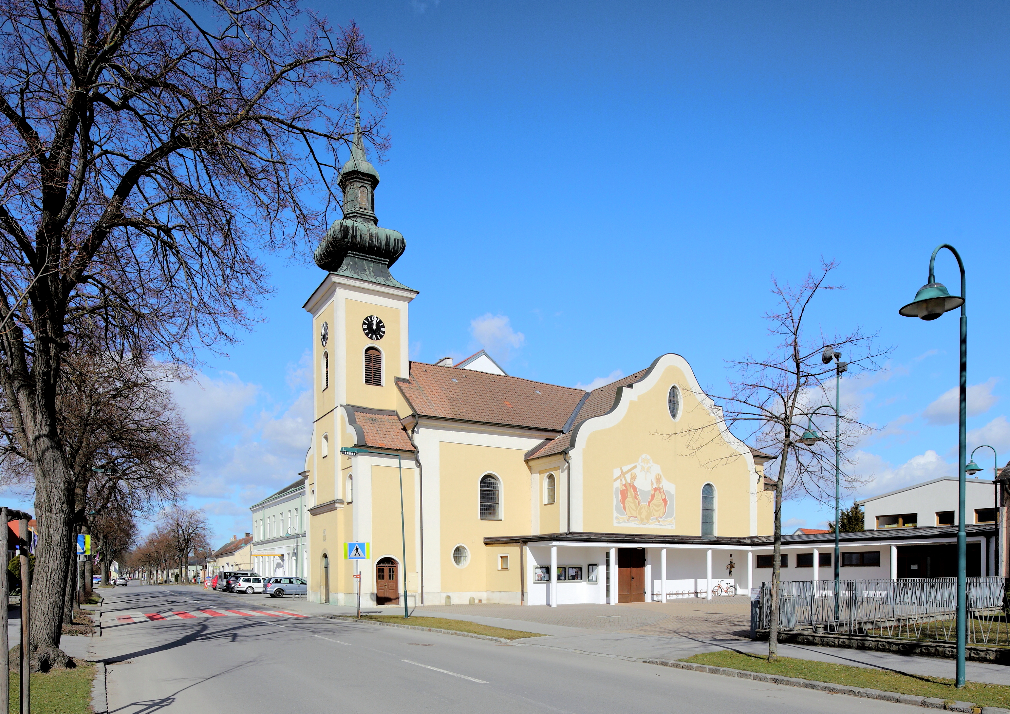 Südansicht der katholischen Pfarrkirche hl. Antonius von Padua in Obersdorf, ein Ortsteil der niederösterreichischen Stadt Wolkersdorf im Weinviertel.